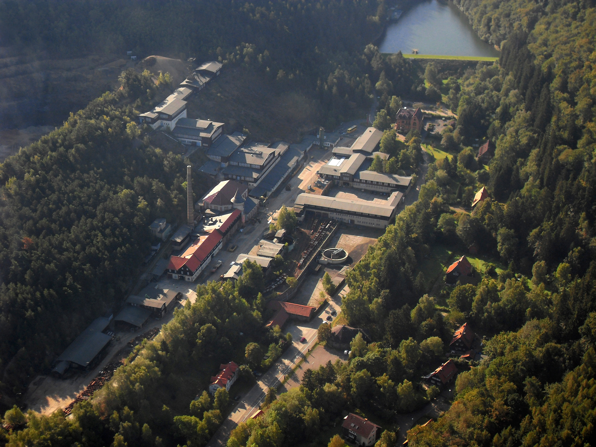 Luftbild des Erzbergwerkes Rammelsberg mit den Verwaltungsgebäuden, Erzaufbereitung und Werkstätten. Am oberen Bildrand ist der Herzberger Teich zu erkennen.